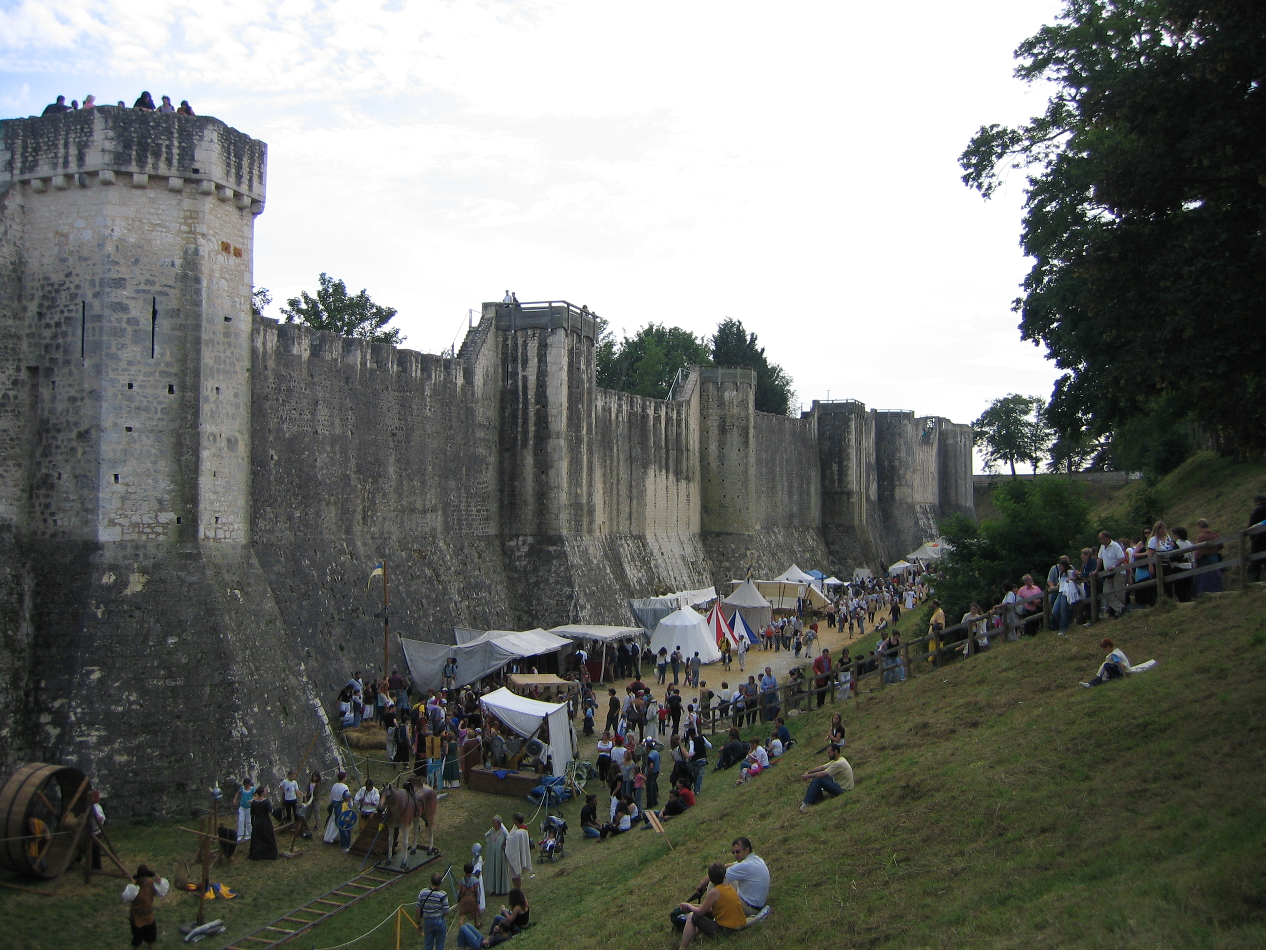 Vue générale de la fête médiévale de Provins